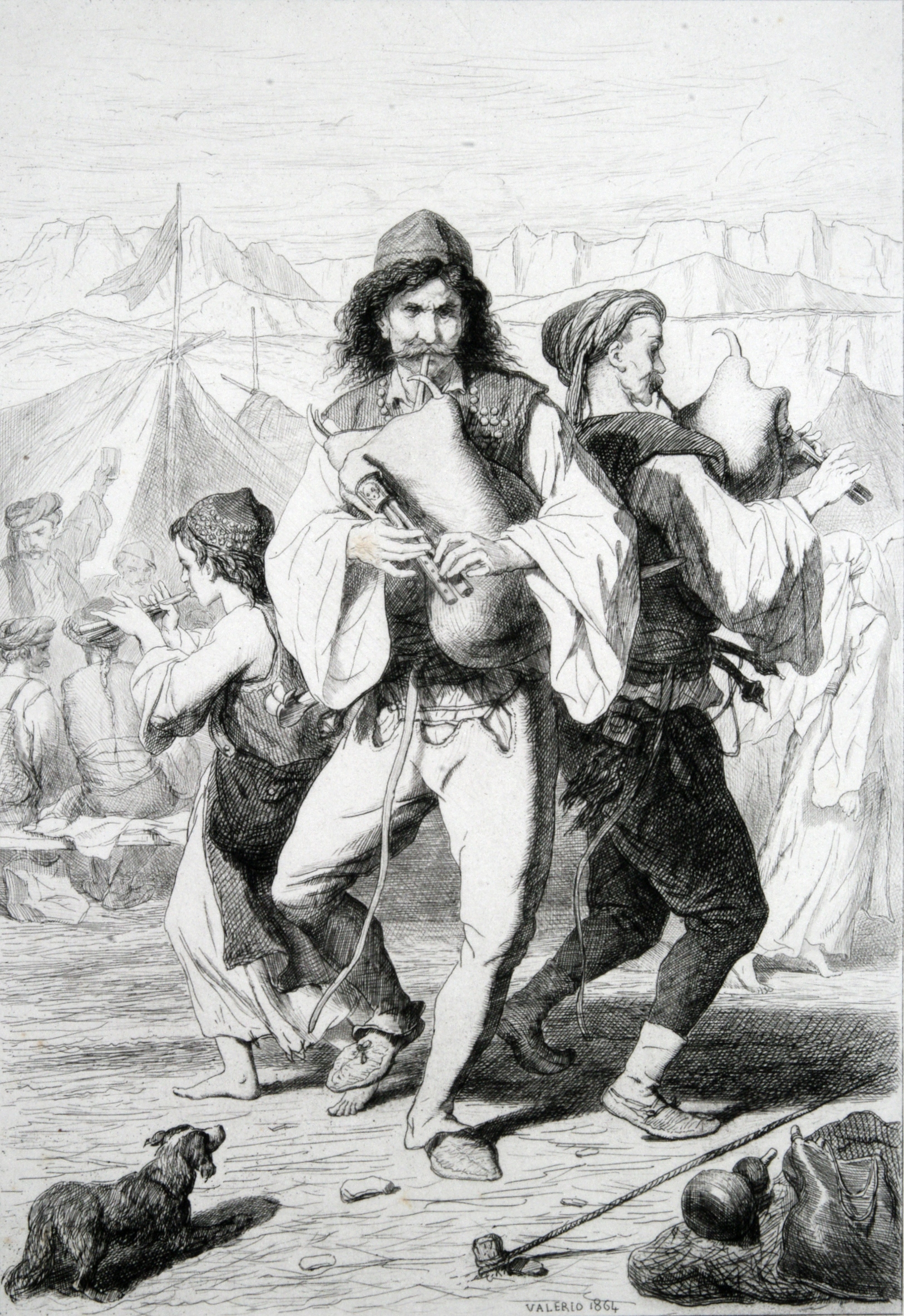 Musiciens Morlaques (Salone)